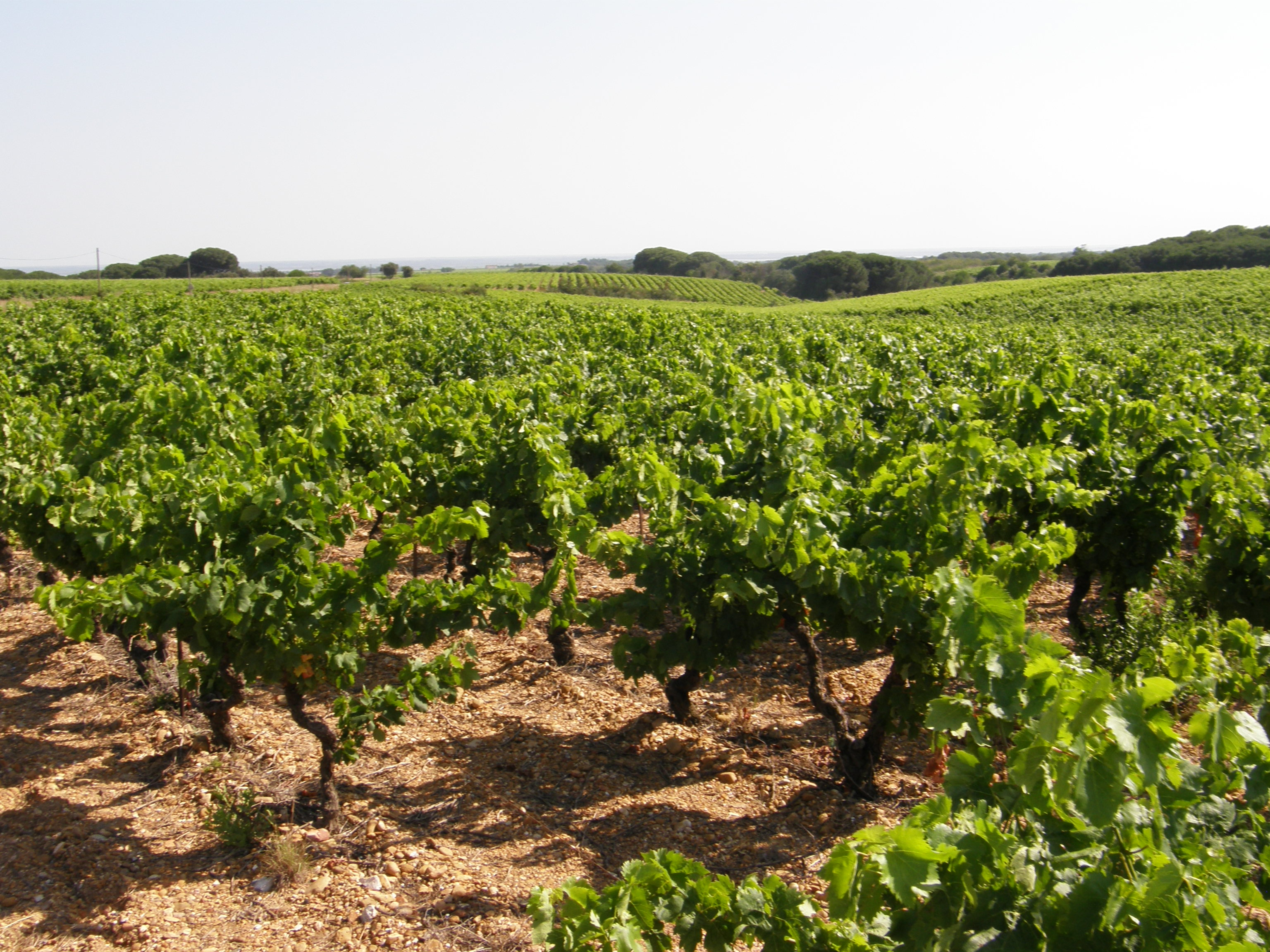 Vignes sur le plateau des Costières (Gard, France)